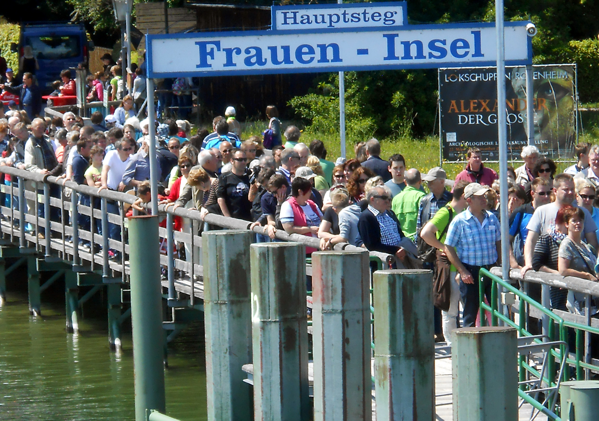 Tagestouristen warten auf der Fraueninsel auf ein Schiff